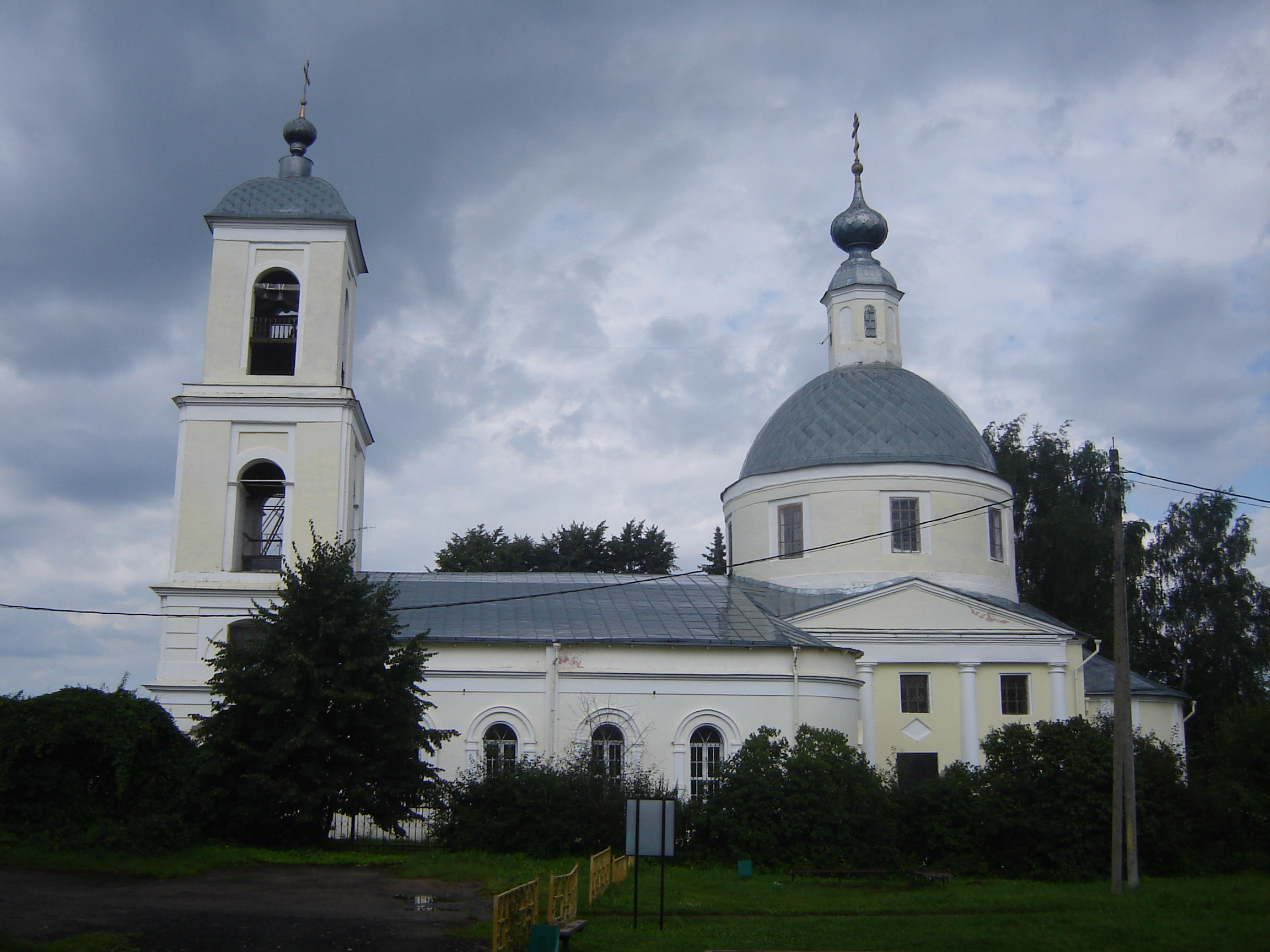 Ильинская церковь в селе Синьково. Приделы Казанской иконы Божьей Матери и Никольский